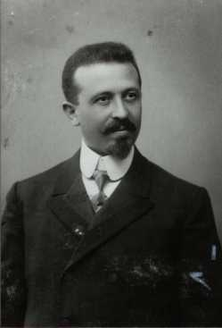 Rabbi Arnold (Aron) Tanzer, rabbi of Göppingen.